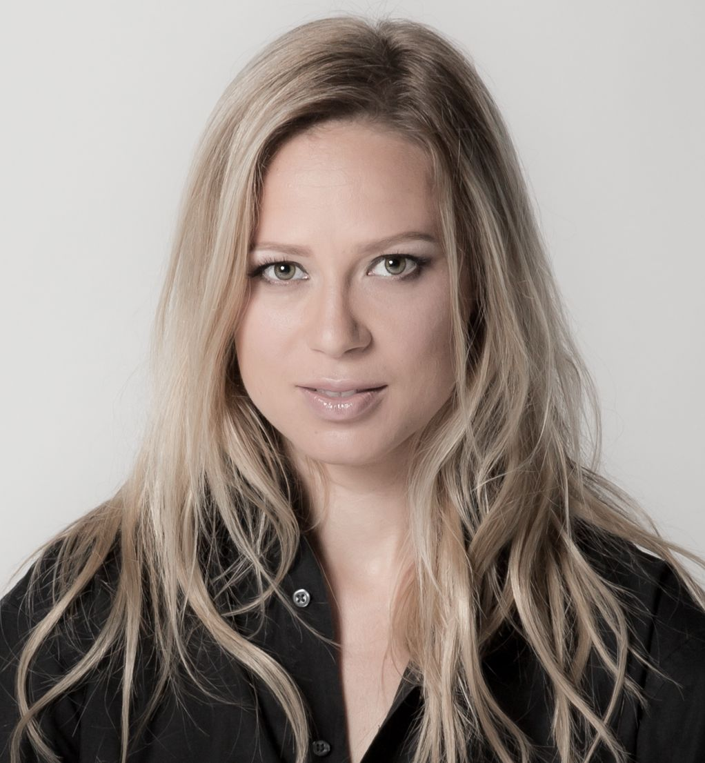 Portrait der Schauspielerin Rita Hatzmann